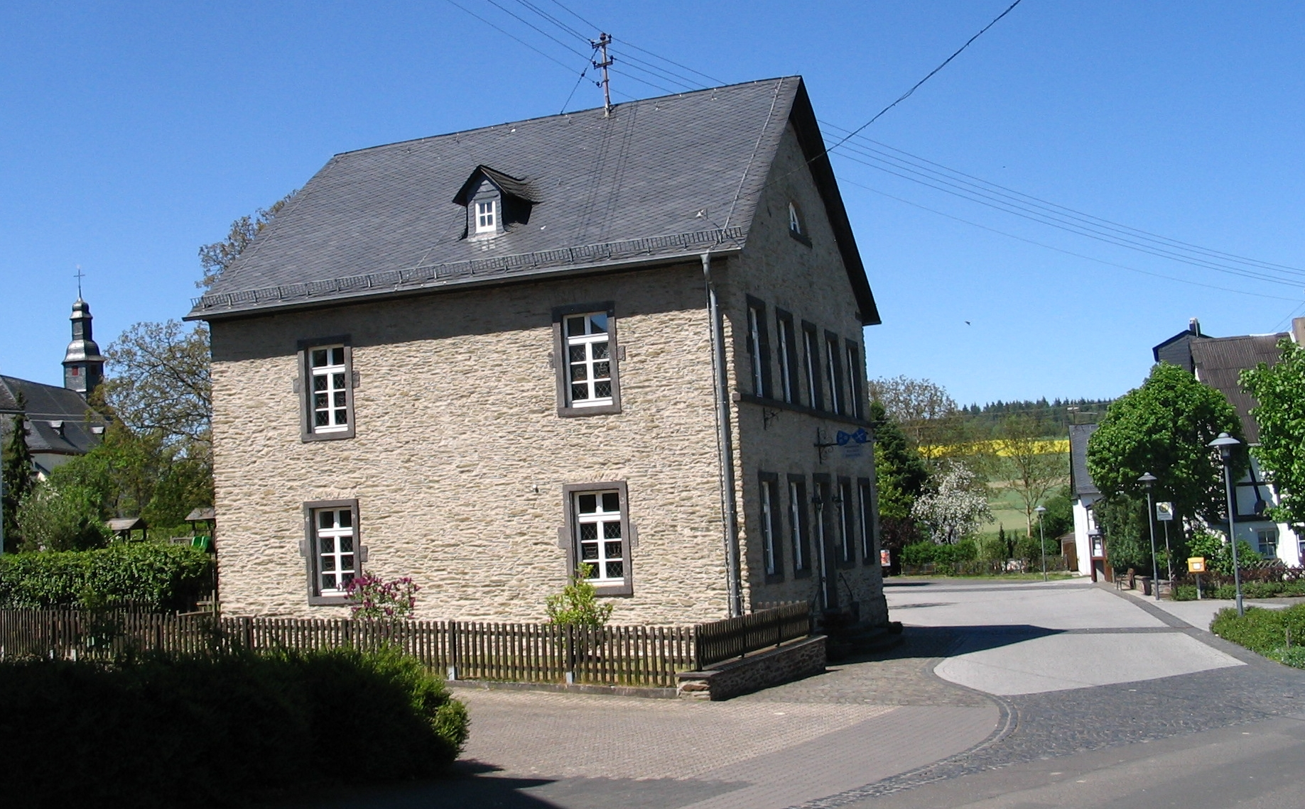 Piesmuseum Dommershausen in the Hunsrück landscape, Germany